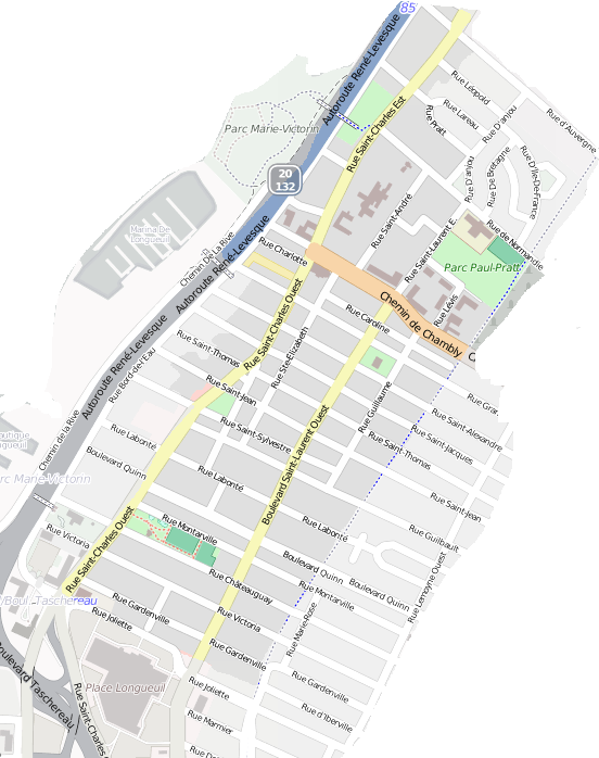 Carte du site patrimonial du Vieux-Longueuil « La forme du site s'apparente à un polygone irrégulier, délimité à l'est [sic] par la rue Saint-Charles Ouest et la rue du Bord-de-l'Eau, au sud par la rue Joliette, à l'ouest [sic] par le réseau vert (piste cyclable) et au nord par la rue d'Auvergne. »